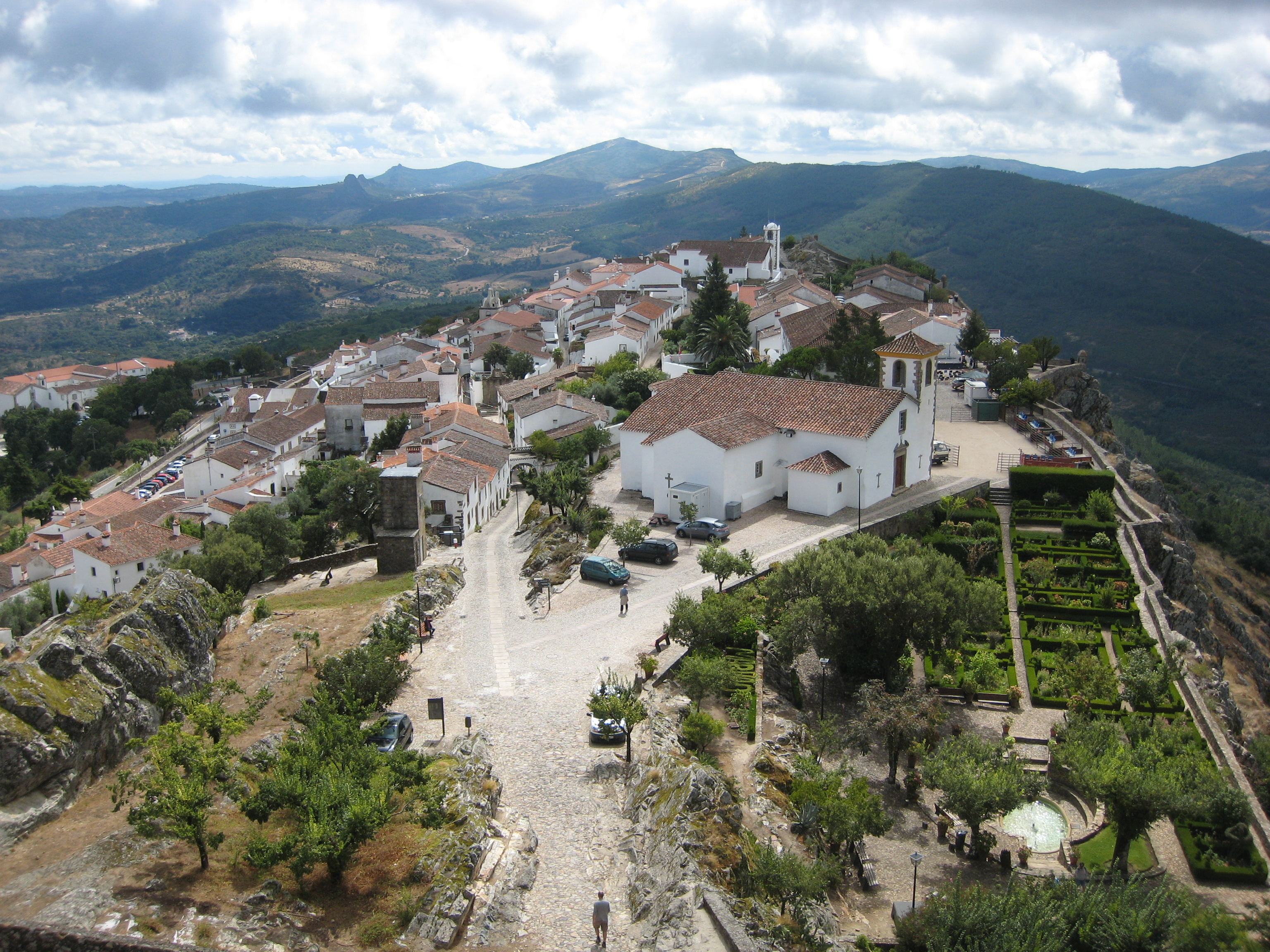 Castelo de Marvão, Marvão, Portugal.